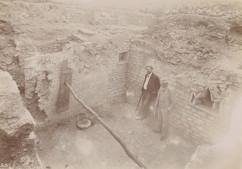 Fouilles d’Alésia, tirages photographiques